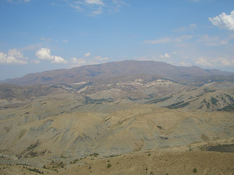 Türkiye'nin Sivas ilindeki en büyük dağlardan biri olan Beydağ (Zara, Sivas).